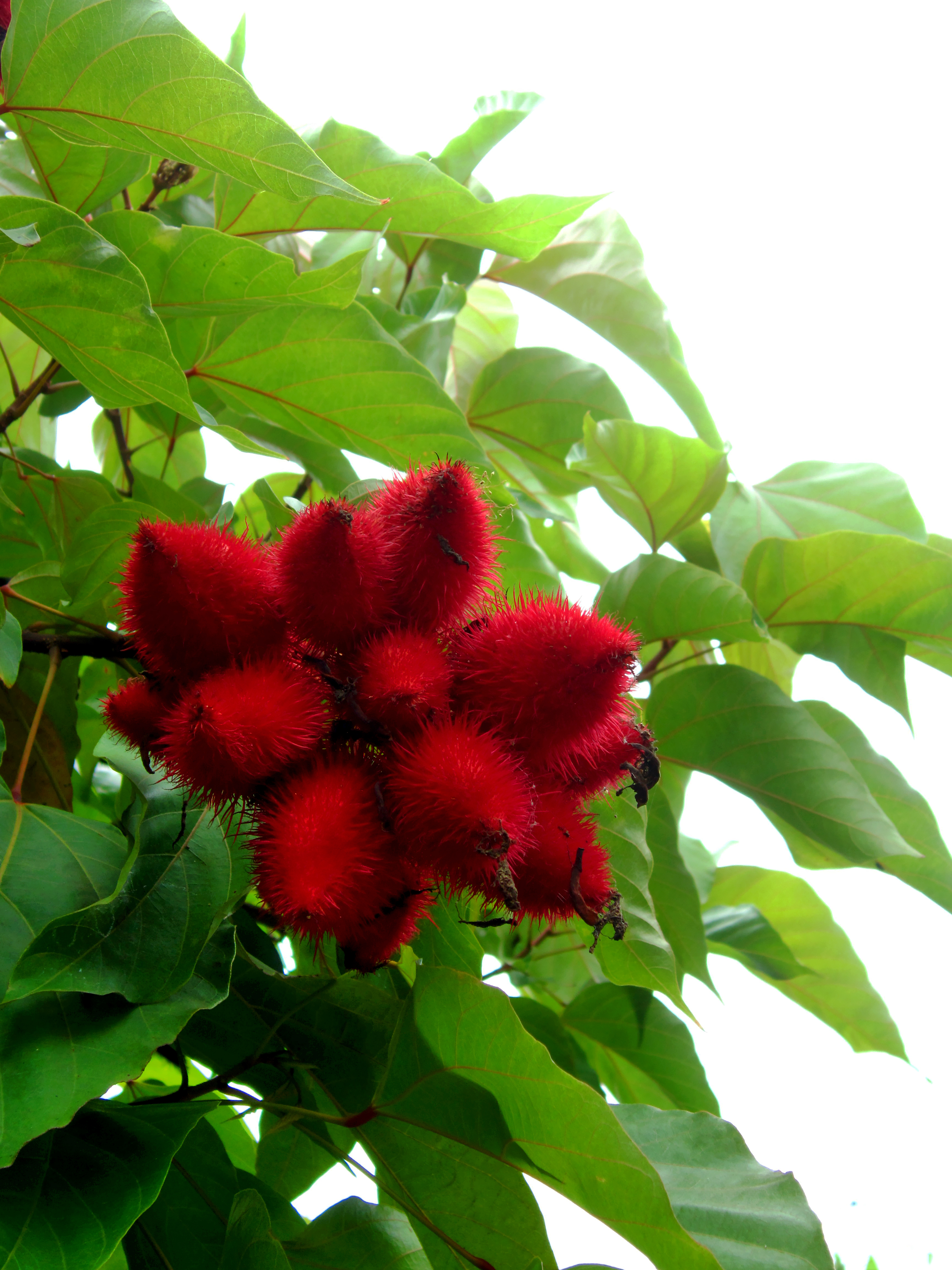 Quả điều màu (Bixa orellana) còn tươi.